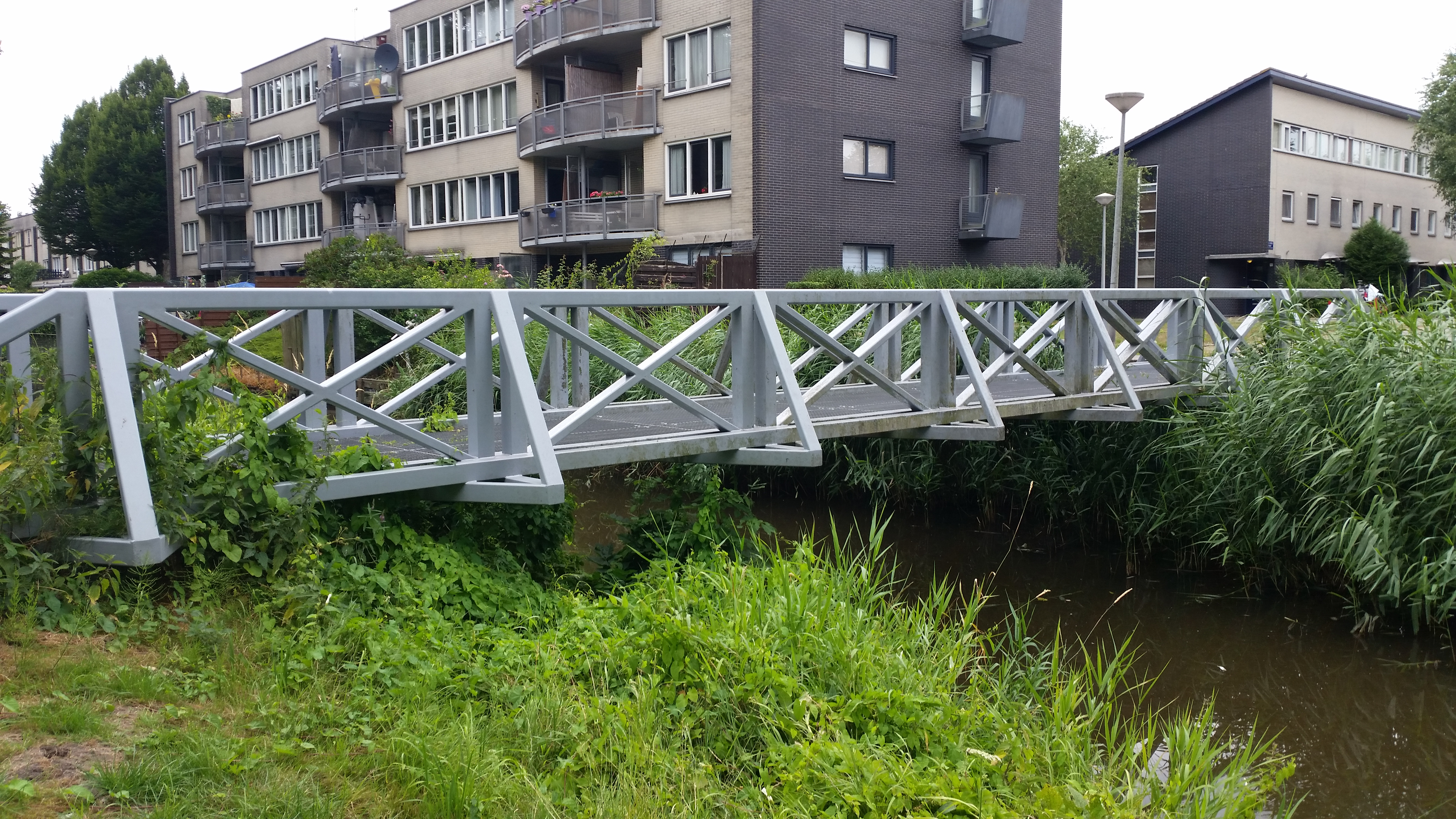 Zijaanzicht van de brug van Brug 1828 (in Amsterdam)